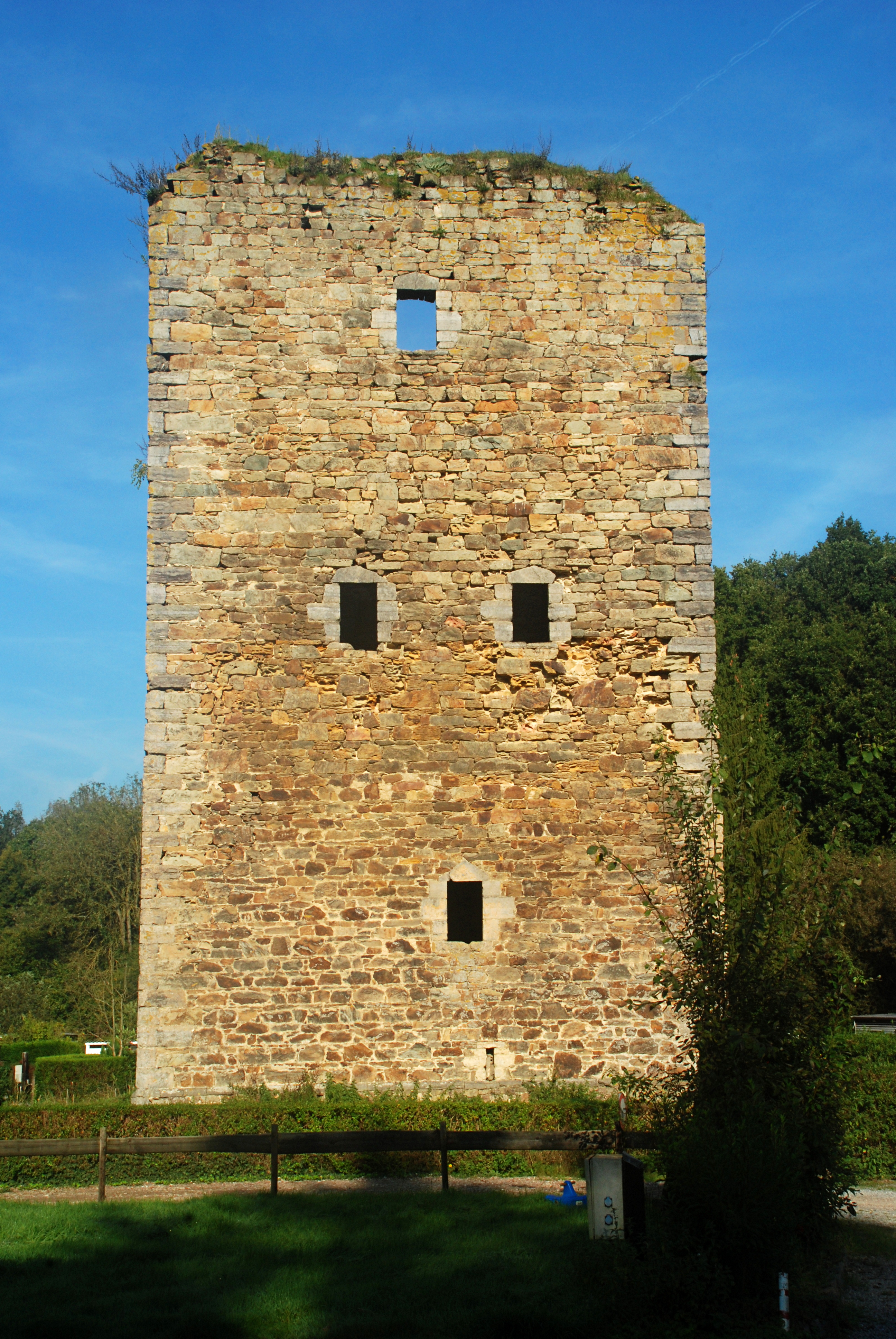 Belgique - Brabant wallon - Walhain - Nil-Saint-Vincent-Saint-Martin - Tour d'Alvaux